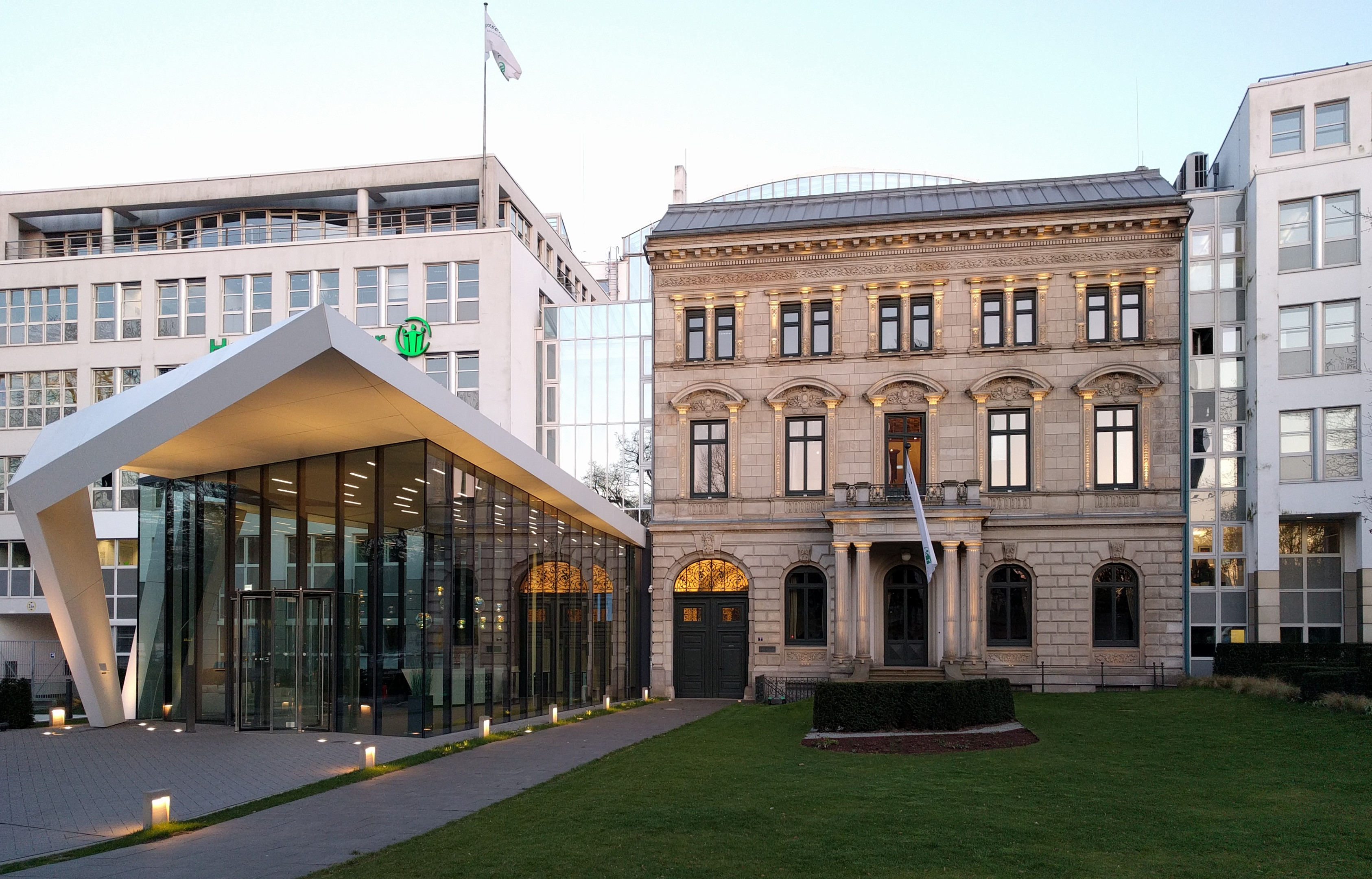 Haupteingang HanseMerkur Versicherungsgruppe in Hamburg